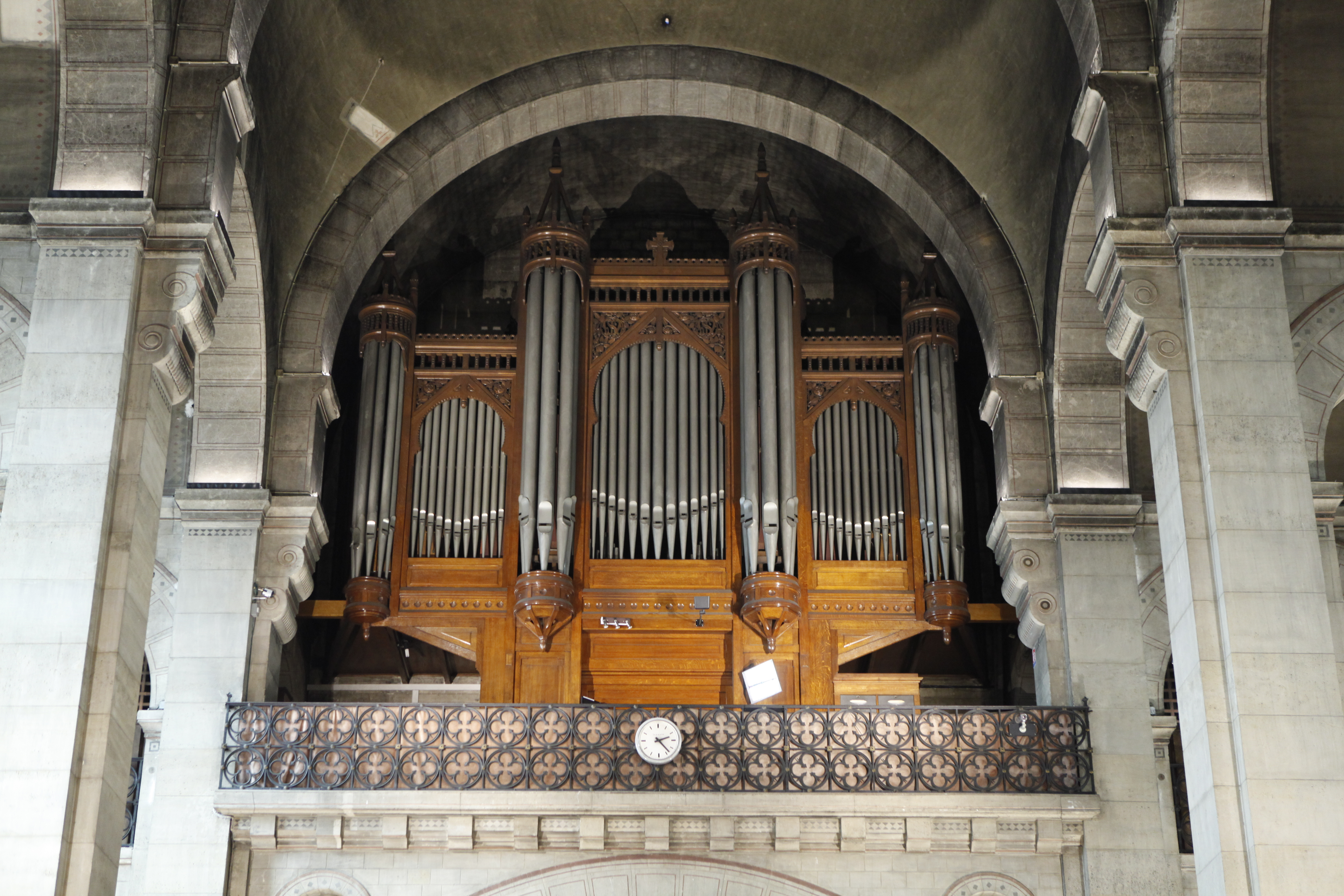 Eglise Notre Dame d'Auteuil